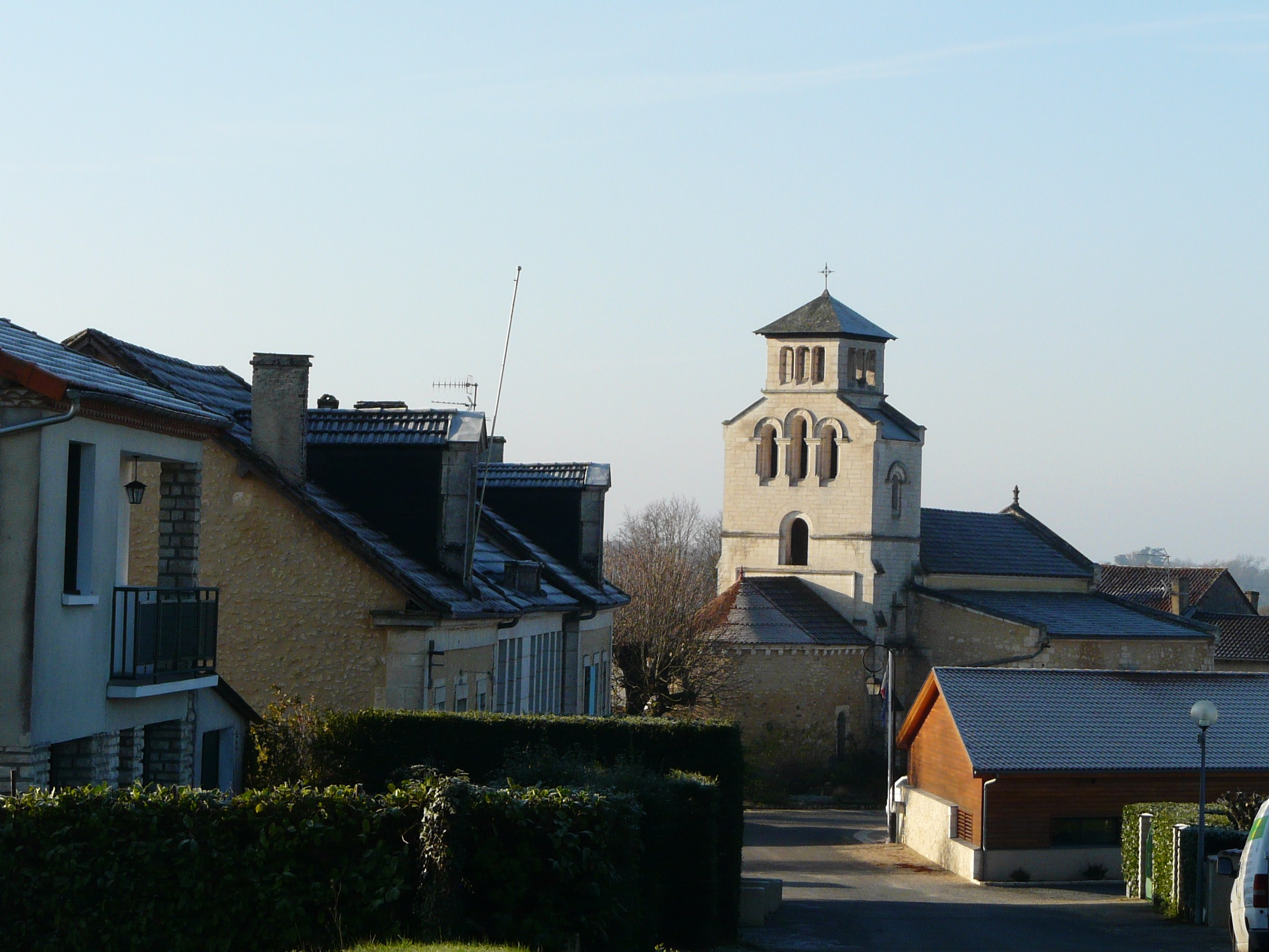 Le village de Chalagnac, Dordogne, France.